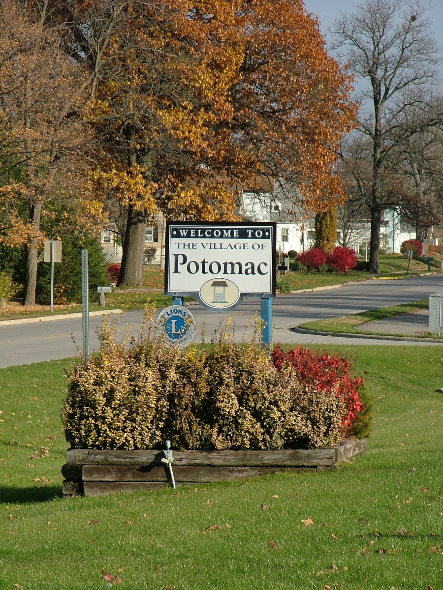 Welcome sign in Potomac, Illinois